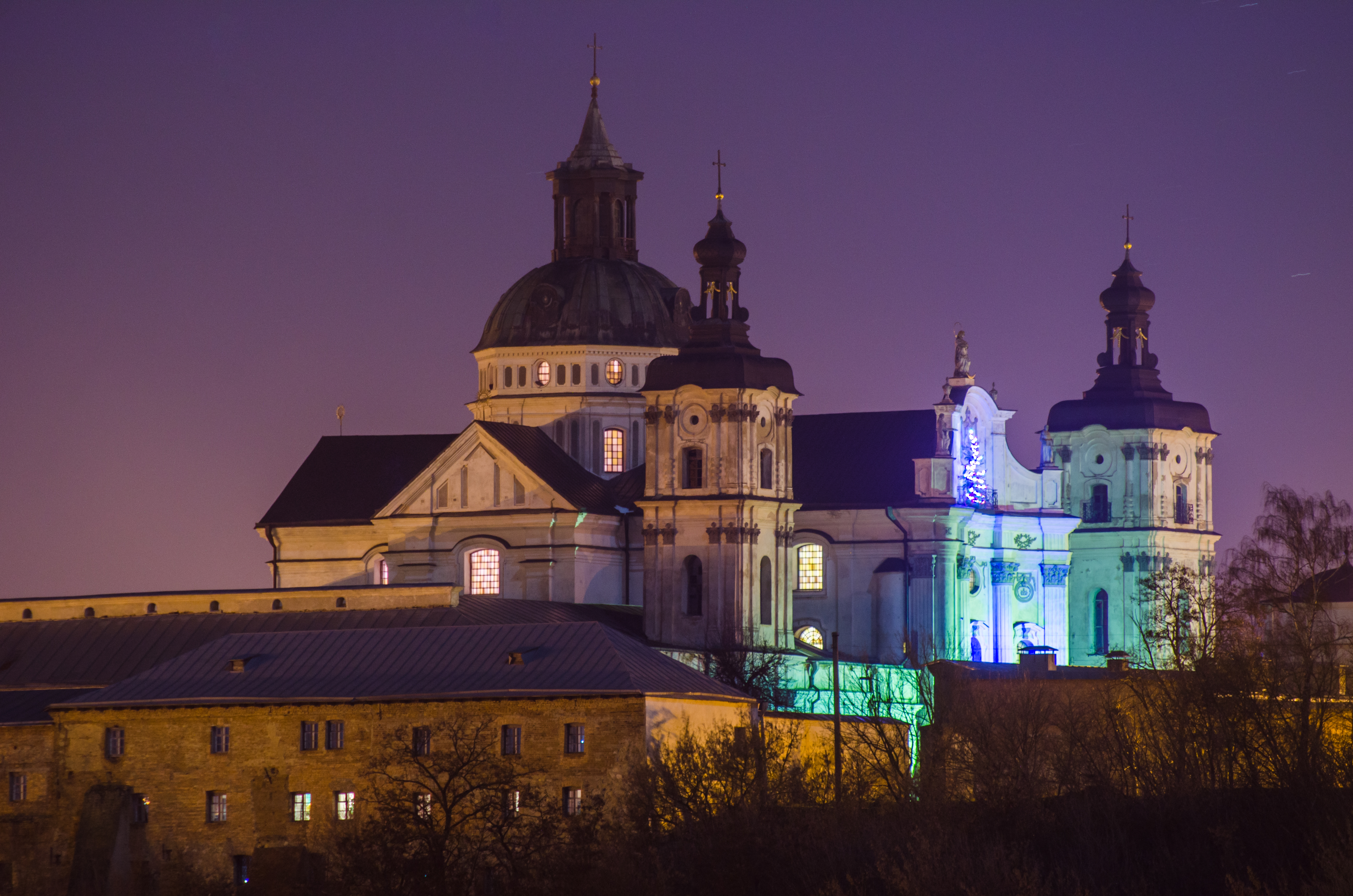 Кармелітський монастир, Бердичів, Соборна пл., 25